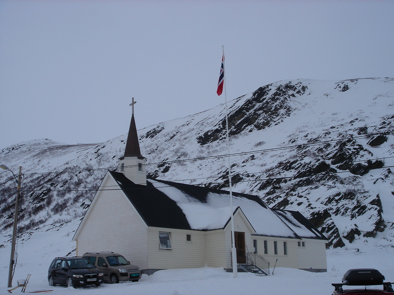 Hop kapell/Hop chapell/ Church in Sjånes/ Kirke på Sjånes